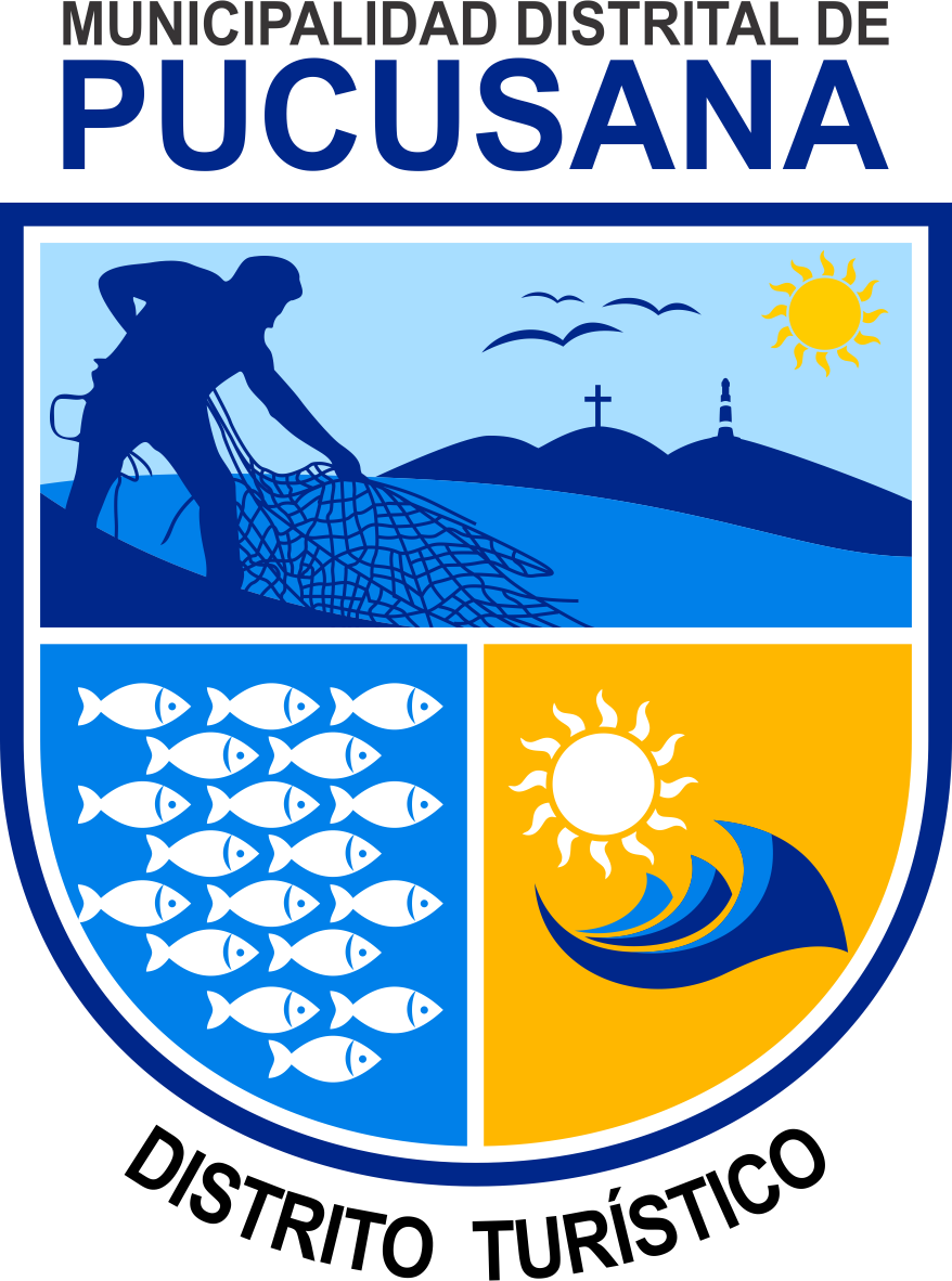 Escudo del Dsitrito de Pucusana - Provincia de Lima - Región Lima